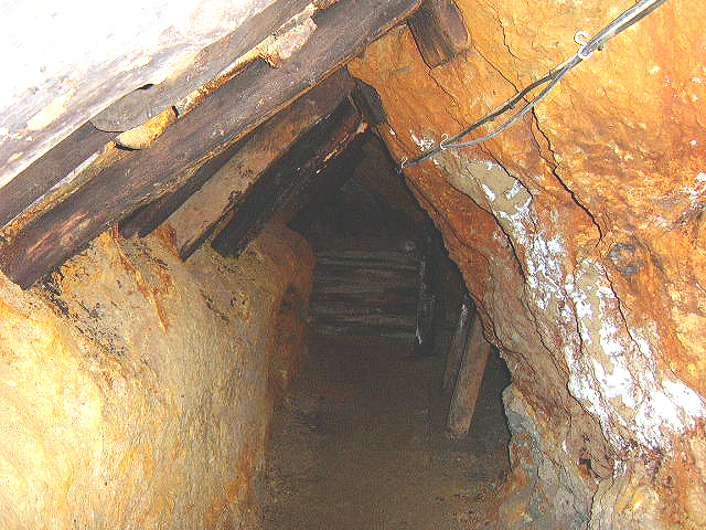 Sicherung der First mittels verkeilter Rundhölzer und Verzug (hier in der Grube Glasebach).